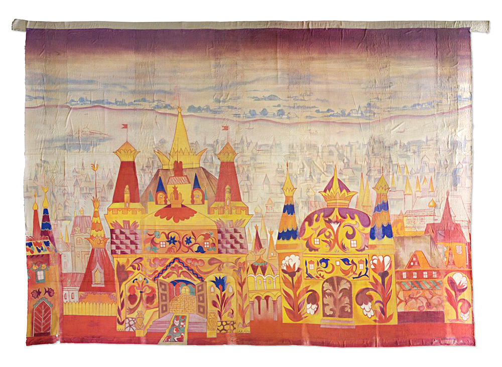 Наталия Гончарова. Декорация к третьему акту балета «Золотой петушок». 1914.